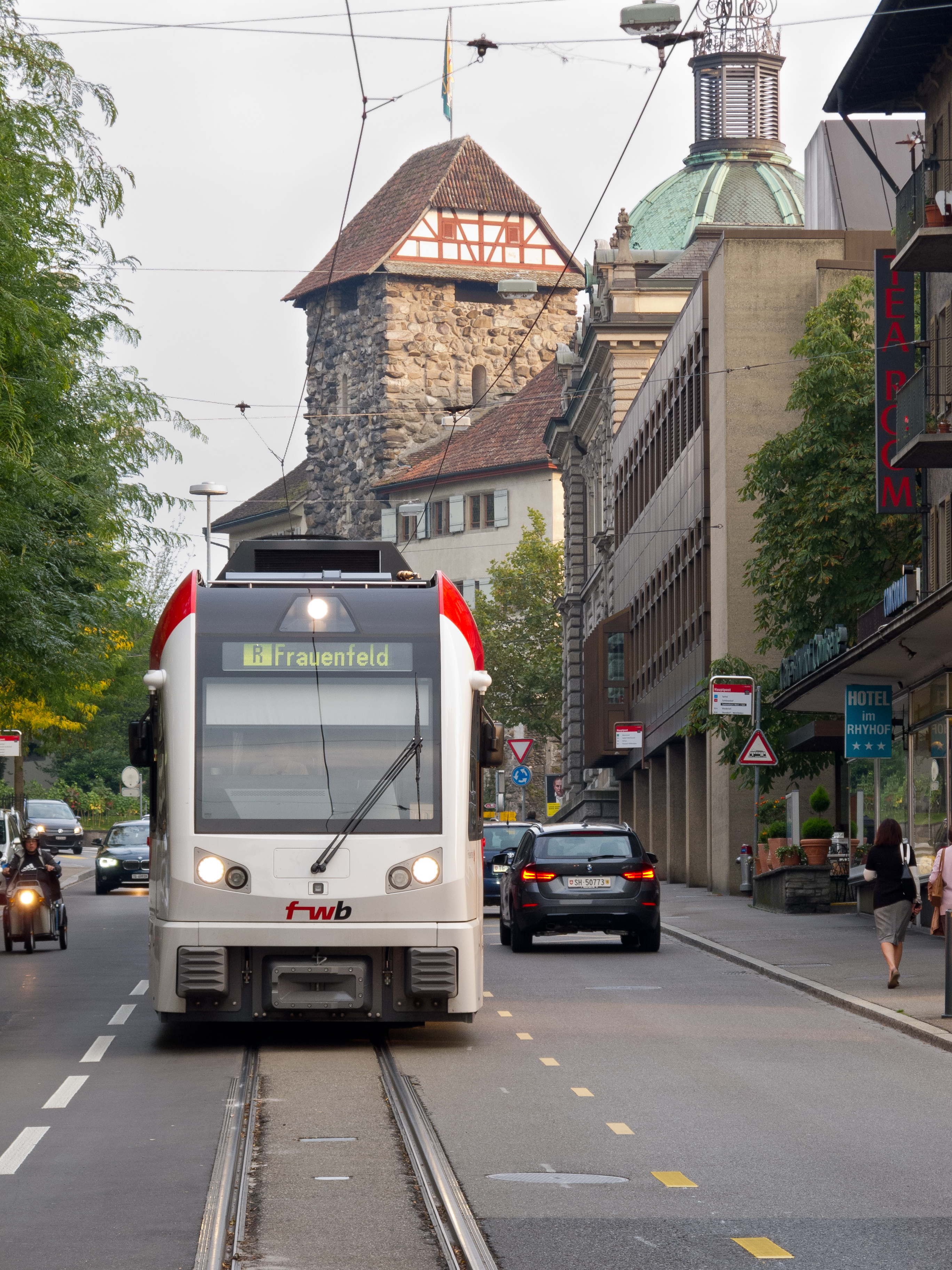 Strassenbahn: neues Fahrzeug der Frauenfeld-Wil-Bahn auf der Rheinstrasse in Frauenfeld